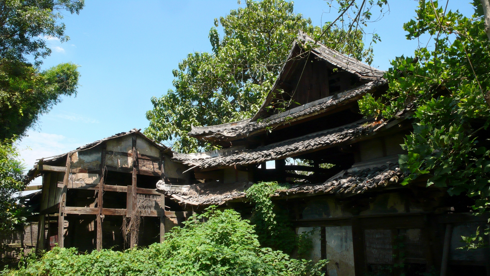 中壩萬壽宮